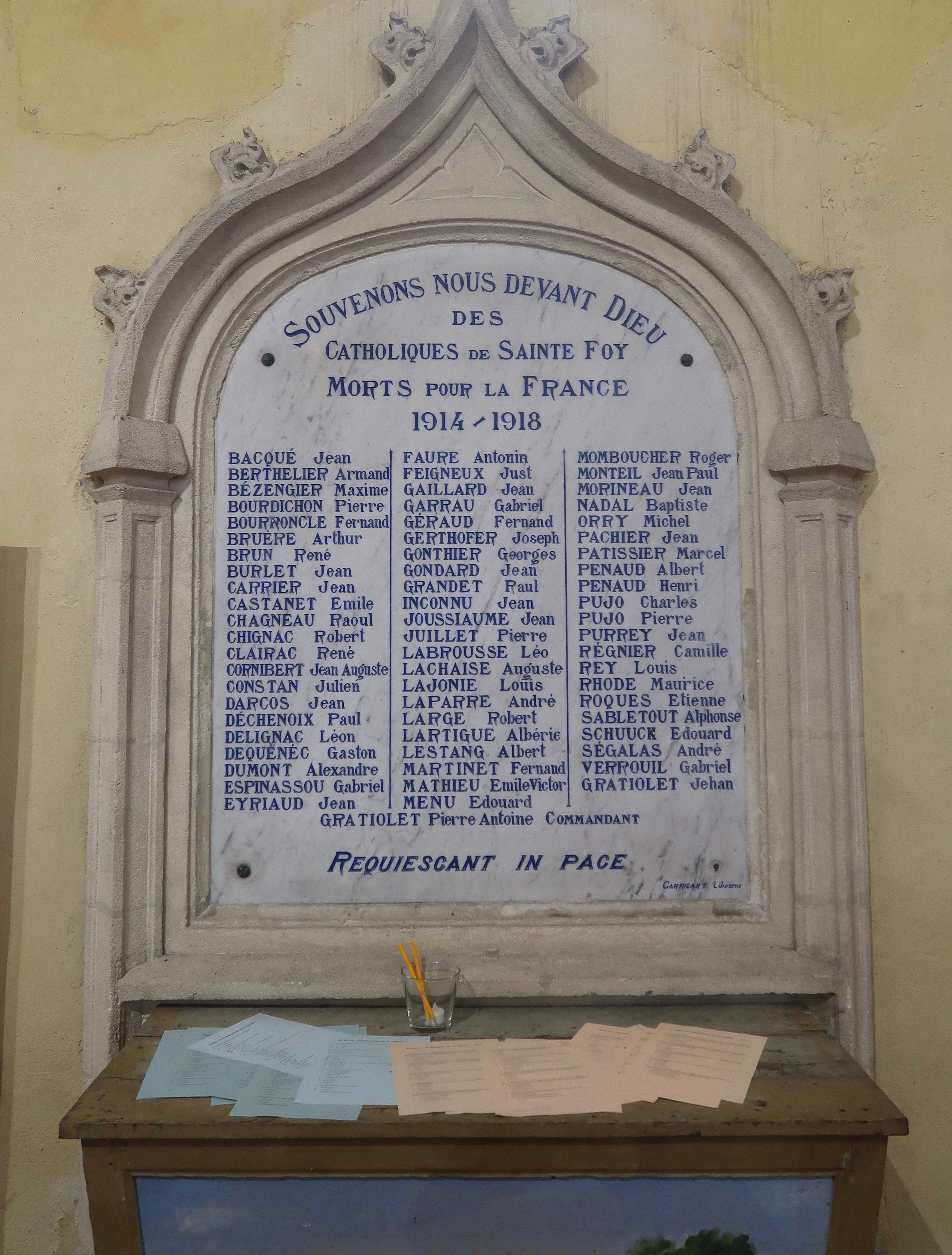 Monument aux morts de la Première Guerre mondiale, dans l'église Notre-Dame de Sainte-Foy-la-Grande (Gironde).